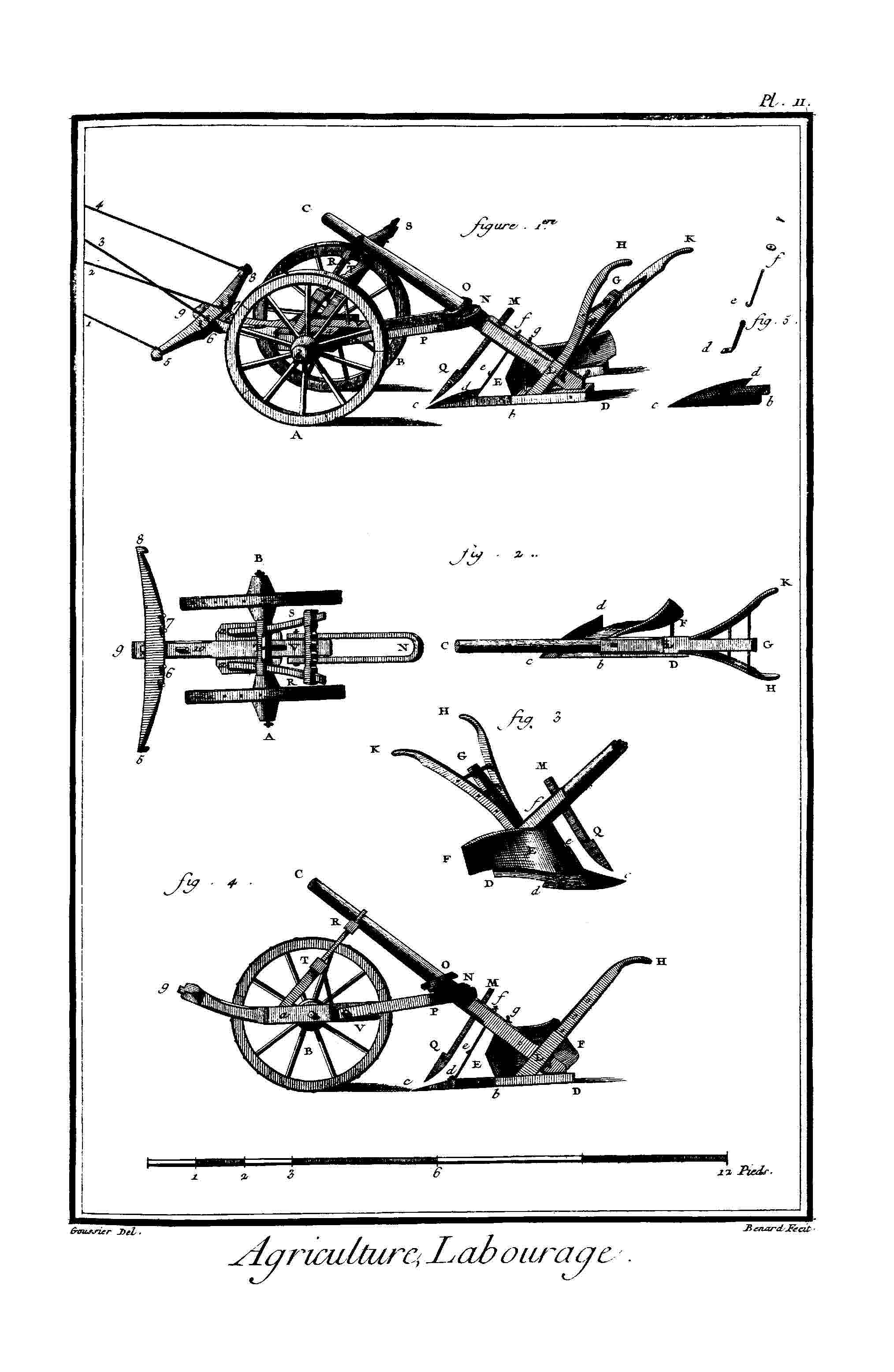 Planches de l'Encyclopédie de Diderot et d'Alembert.